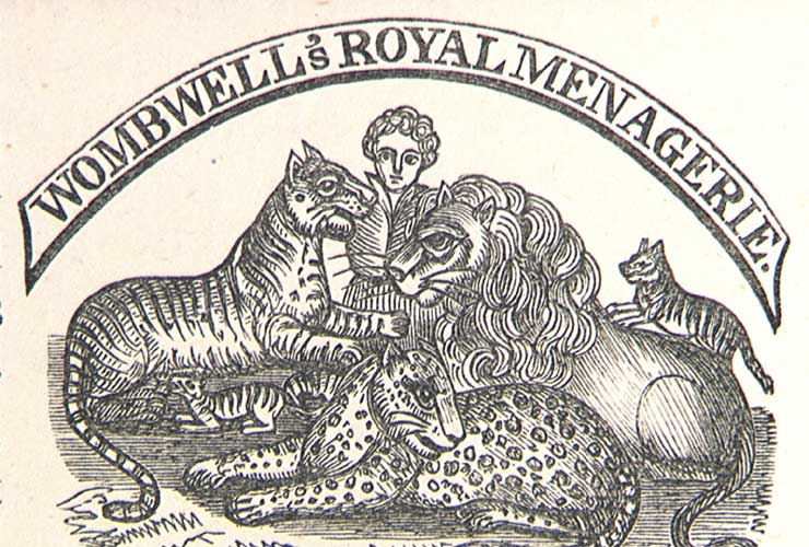 Wombwell's Royal Menagerie Anschlagzettel der Wandermenagerie des George Wombwell Frühes 19. Jahrhundert